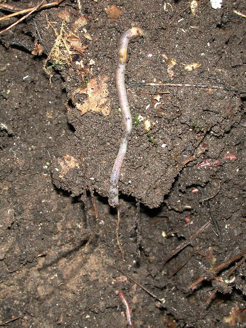 Regenwurm im Erdboden - Schnitt.